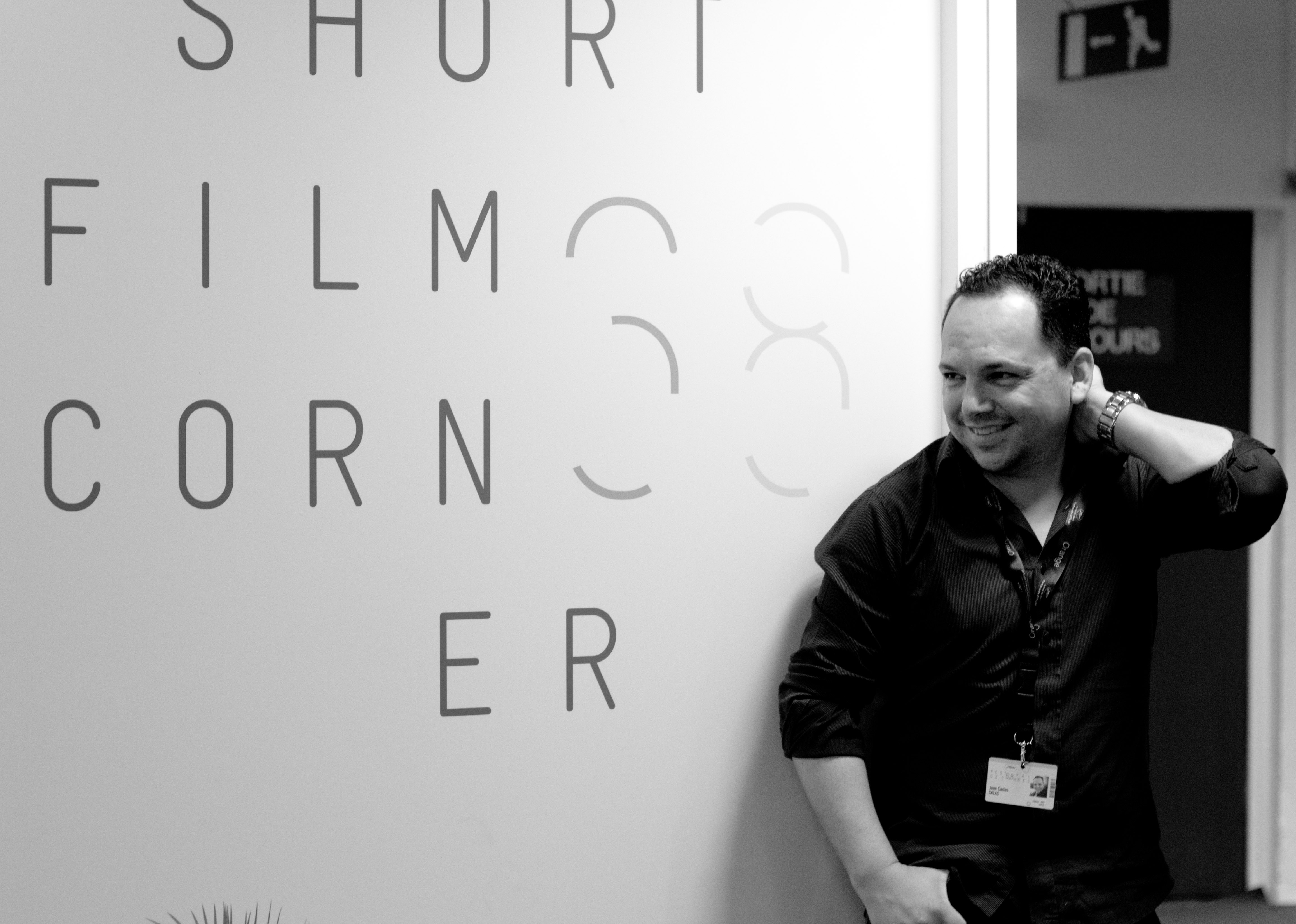 En la filmación de Paraguay 76